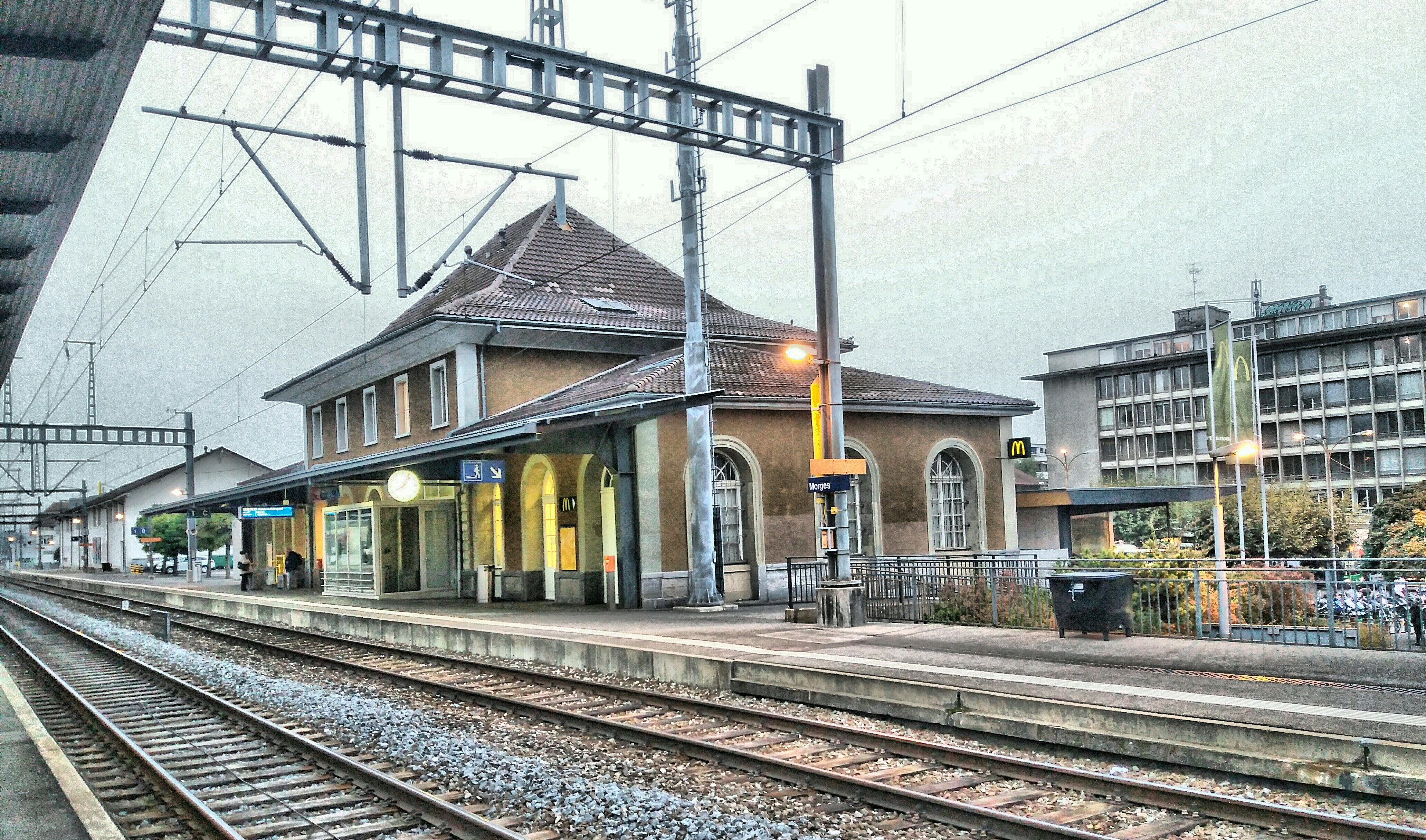 Gare de Morges, vue de l'ouest